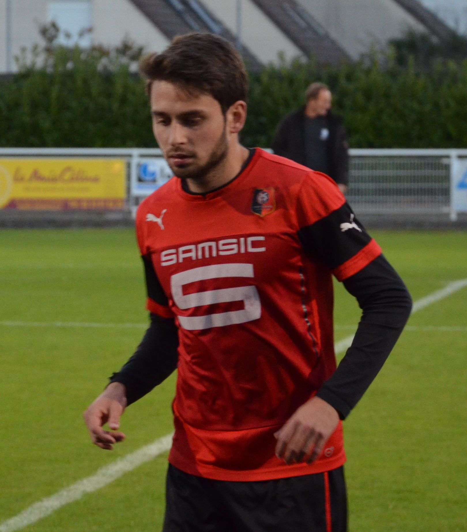 Photographie prise avant la rencontre de CFA2 opposant l'US Granville à la réserve du Stade rennais. Ici, Sanjin Prcic.